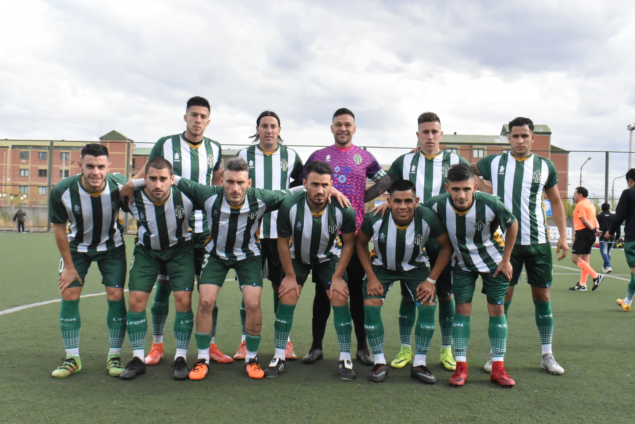 Arriba: Gimenez, Russo, Martinez, Font y De La Rosa Abajo: Enzo Díaz, Fuentealba, Ceratto, Castro, Enzo Fernández y Lencina.